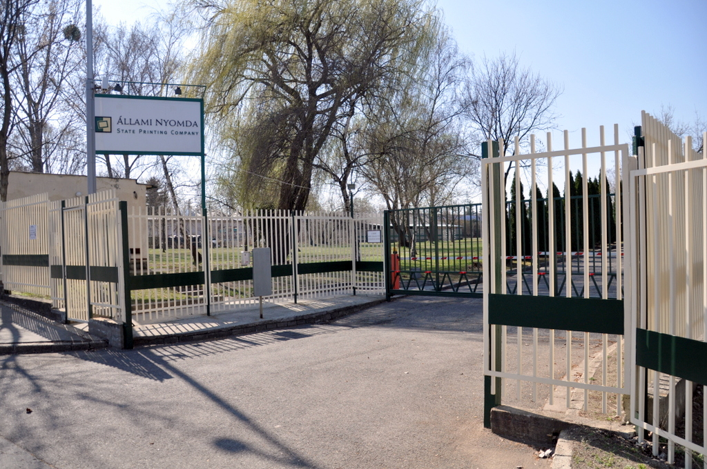 Állami Nyomda / State Publishing company